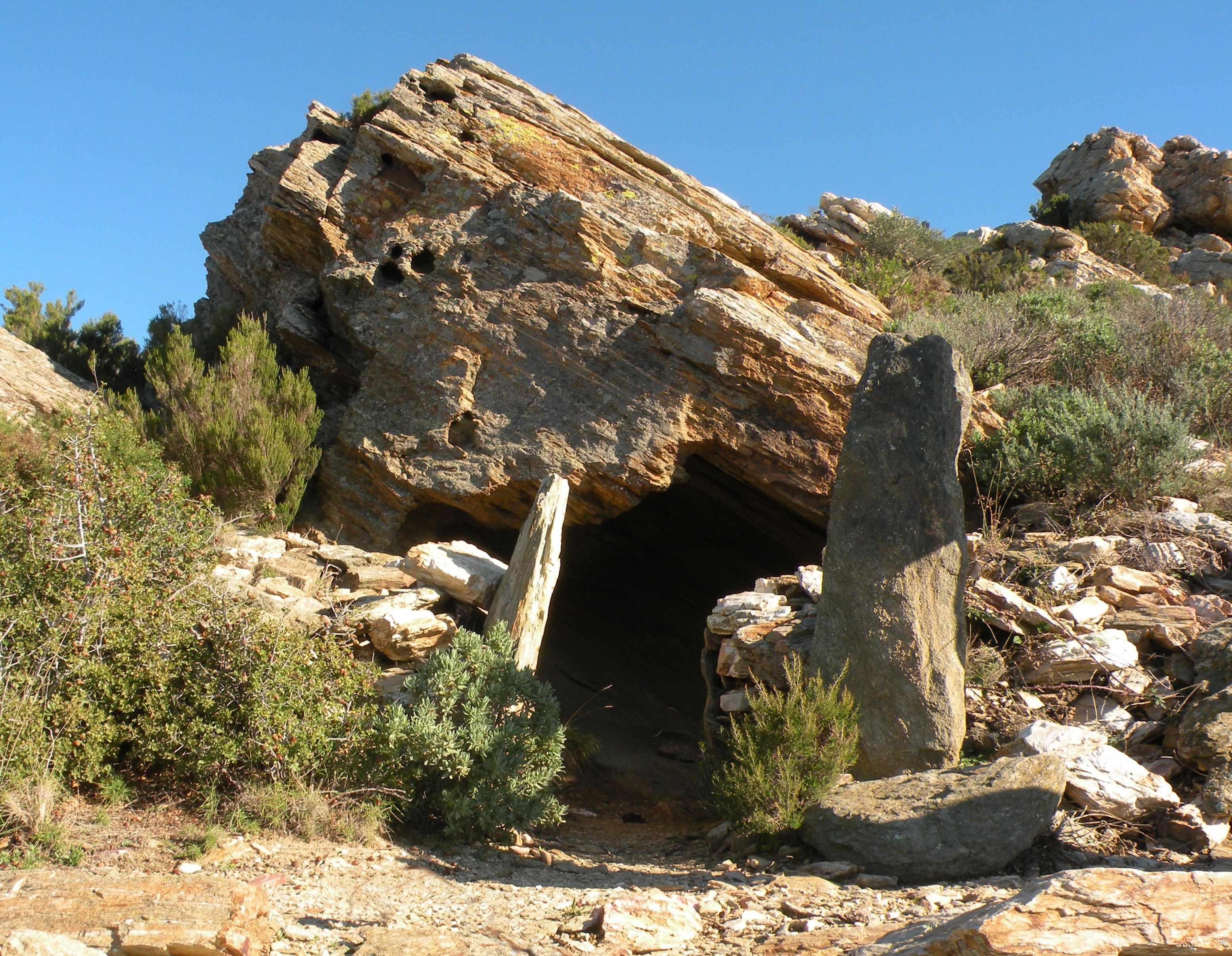 Cova-Dolmen de la Quarantena II, Roses, Catalonia